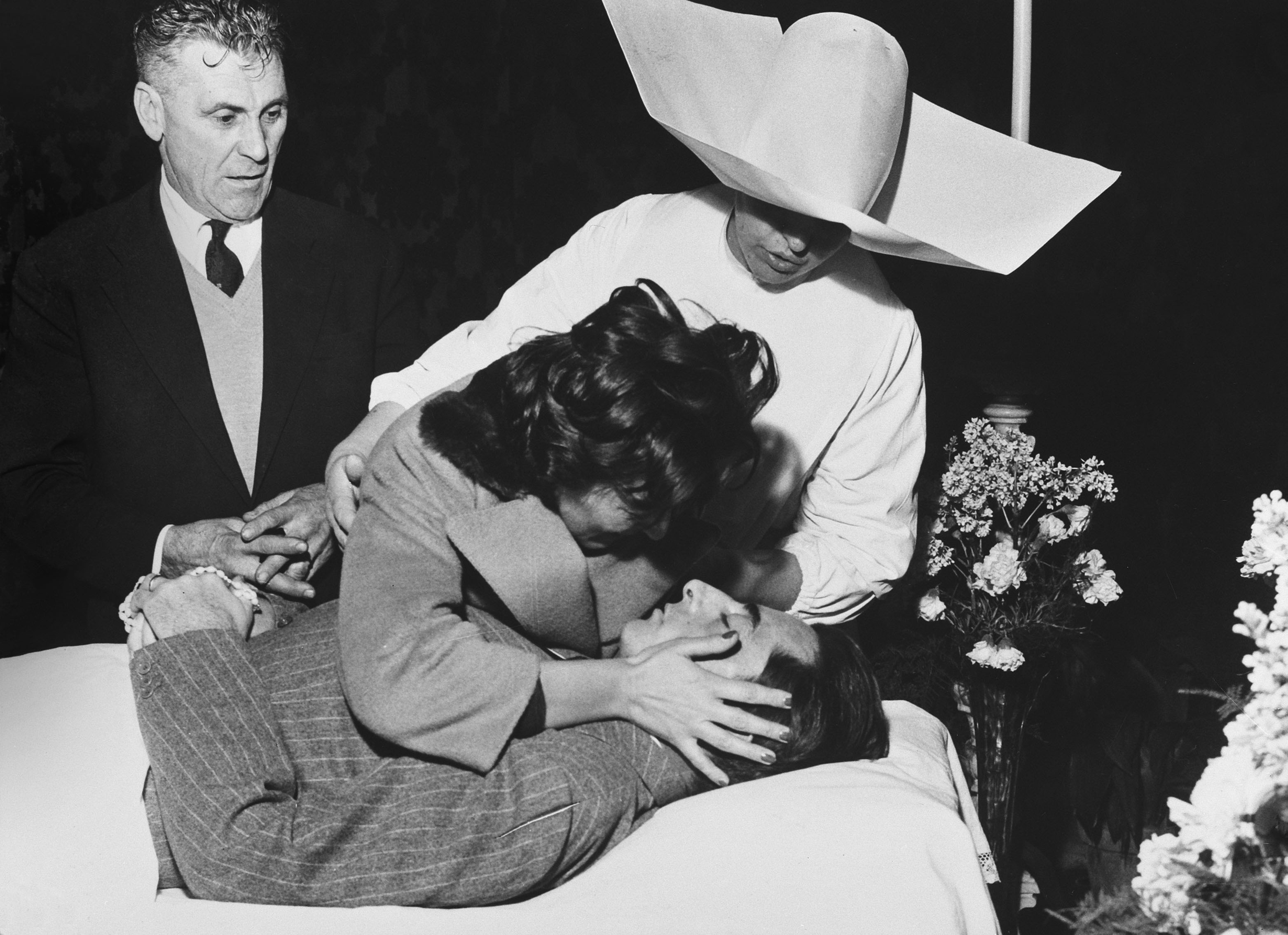 Vrouw van Fausto Coppi, Guilia Occhini bij de baar.